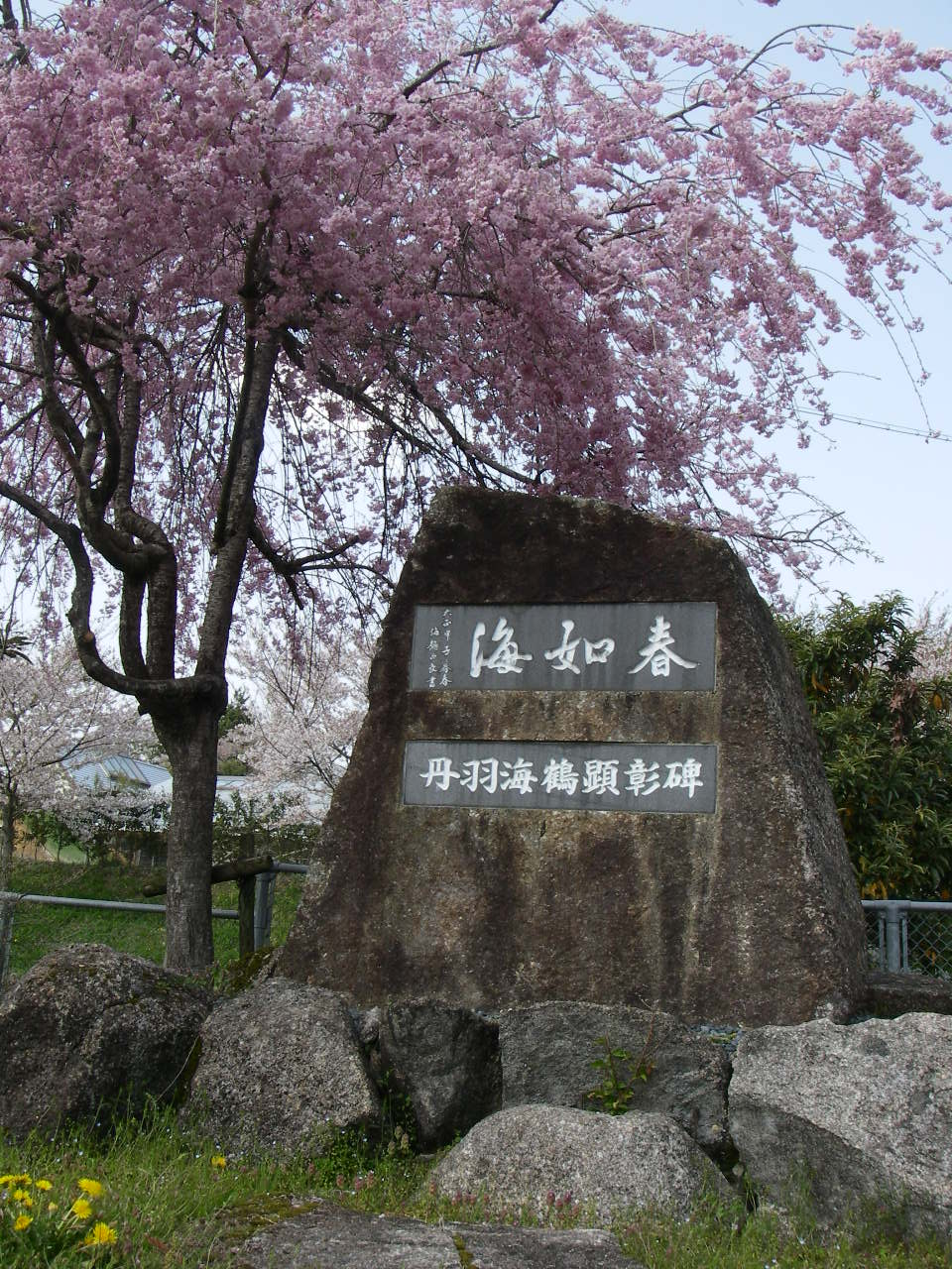 丹羽海鶴の生誕地である中津川市田瀬に建立されている顕彰碑。 国道２５７号線田瀬交差点を新田瀬橋方面に曲がり２５０ｍの地点にあります。